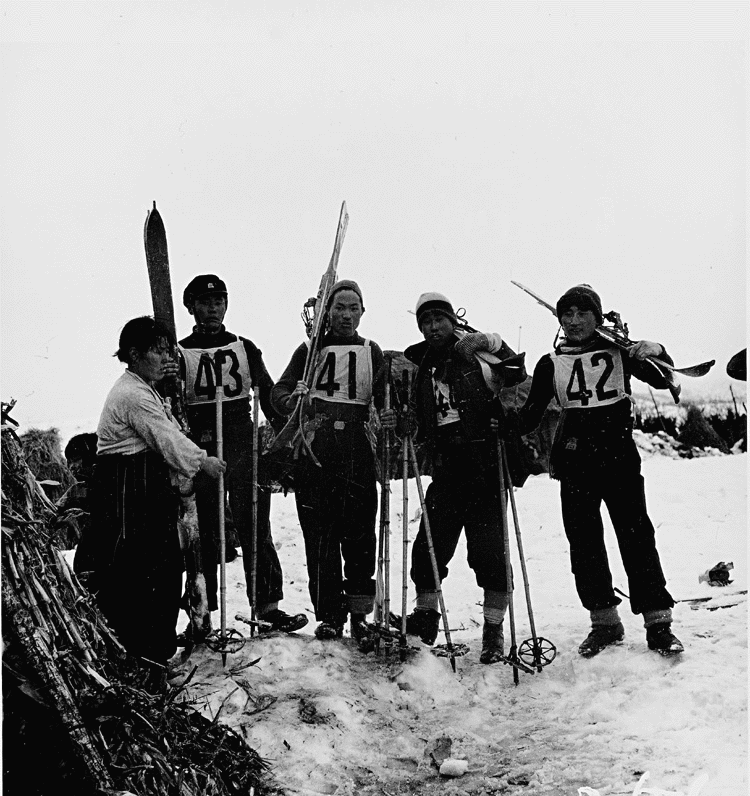 촬영일 : 1954년 02월 14일 촬영장소 : 대한민국 강원도 대관령 참석자 : 미상 관련내용 : 경기 보조요원은 스키장에 어울리지 않게 한복 차림이다.